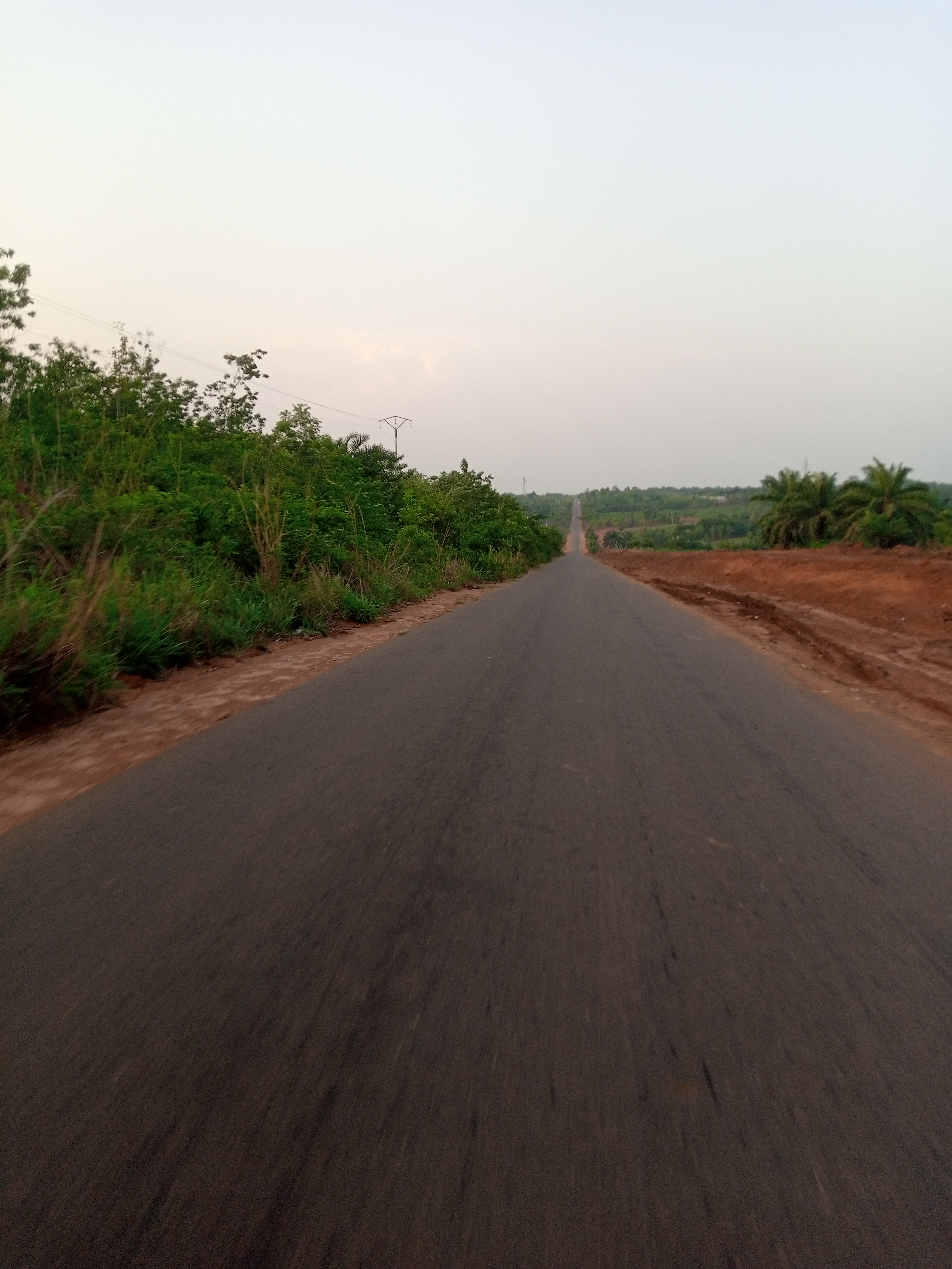 Voie de Sakété - Pobé This is an image with the theme "Africa on the Move or Transport" from: Benin